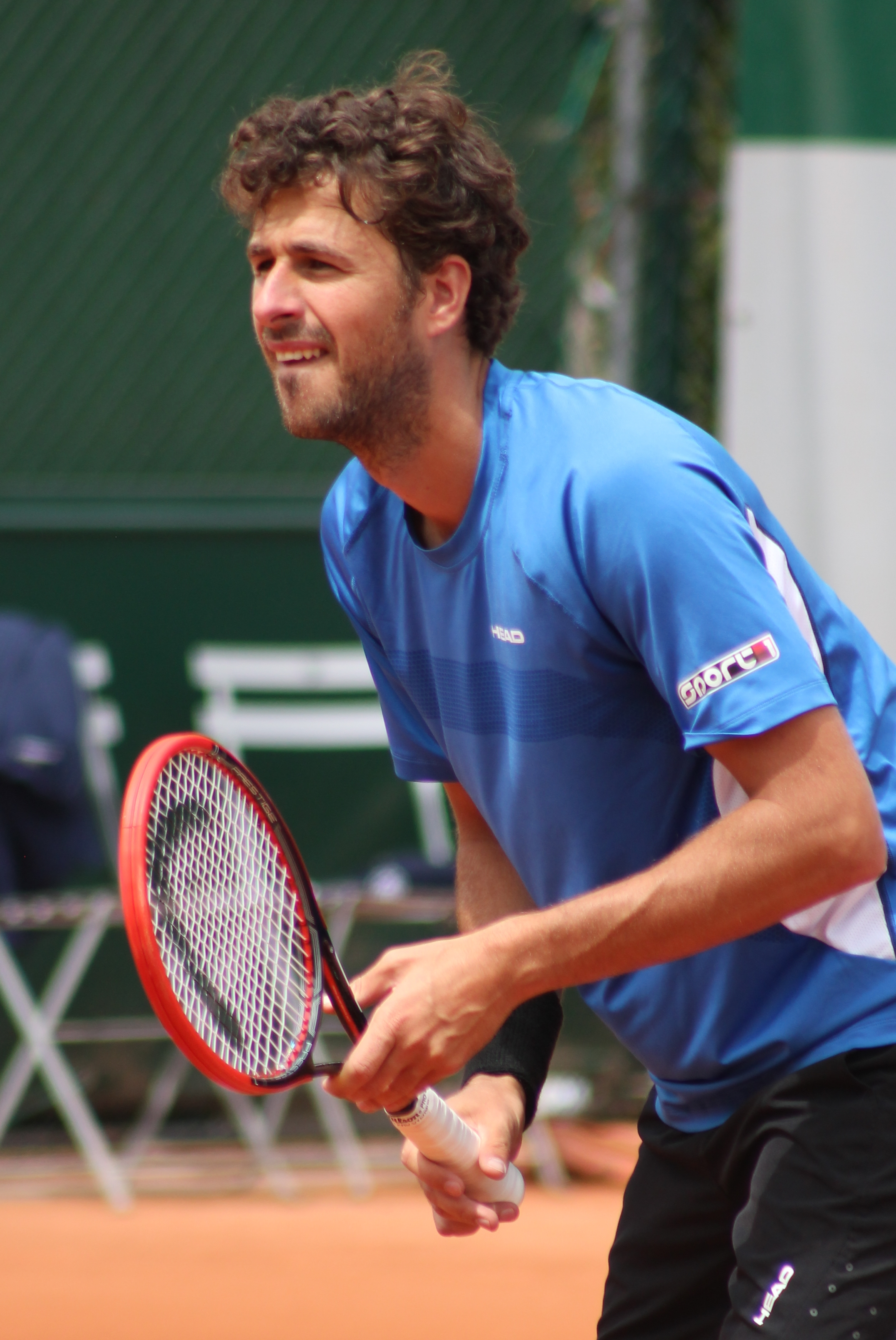 Haase RG15 (2)